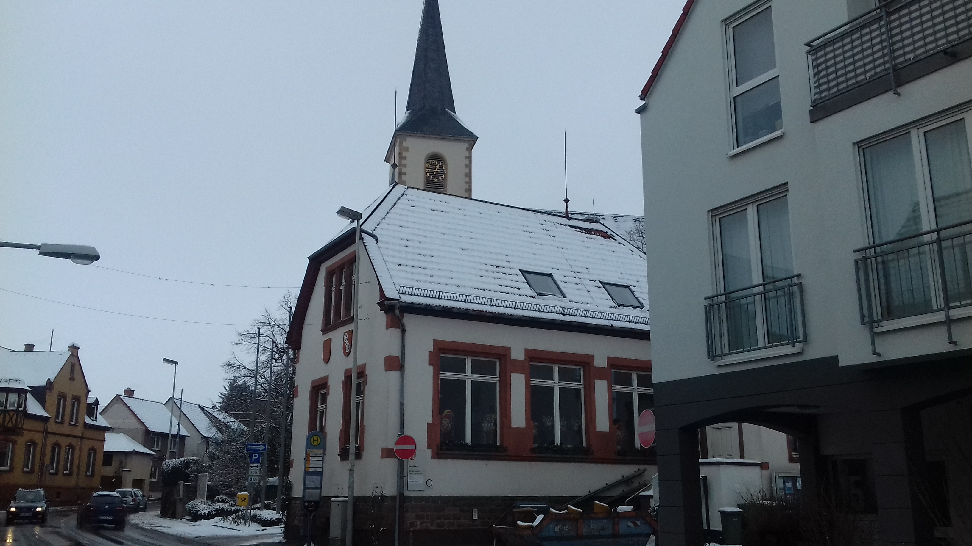 Die Ortsverwaltung in Mainz-Ebersheim, im Hintergrund die Kirche St. Laurentius